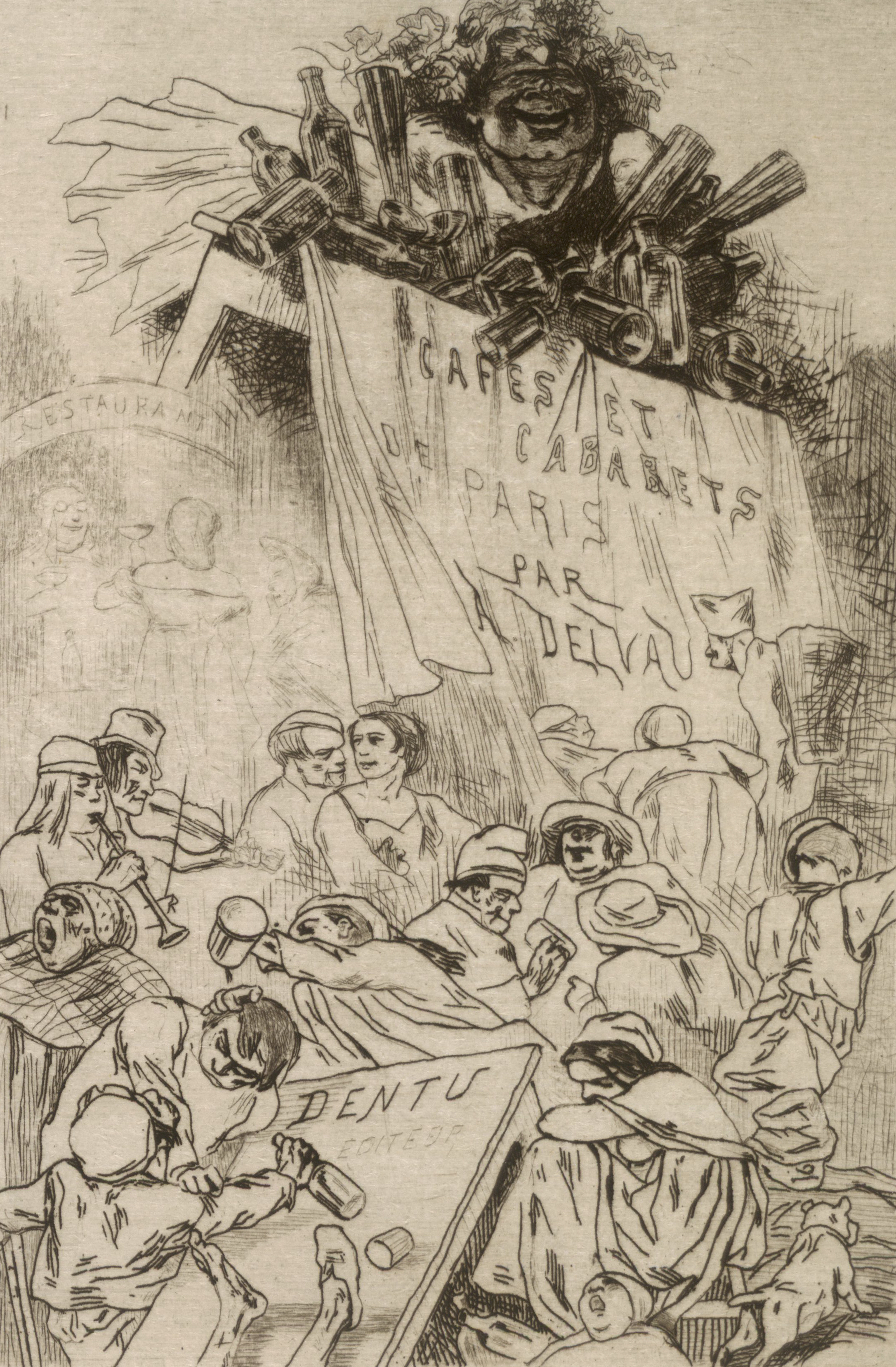 Frontispiece from Alfred Delvau's Histoire anecdotique des cafés & cabarets de Paris